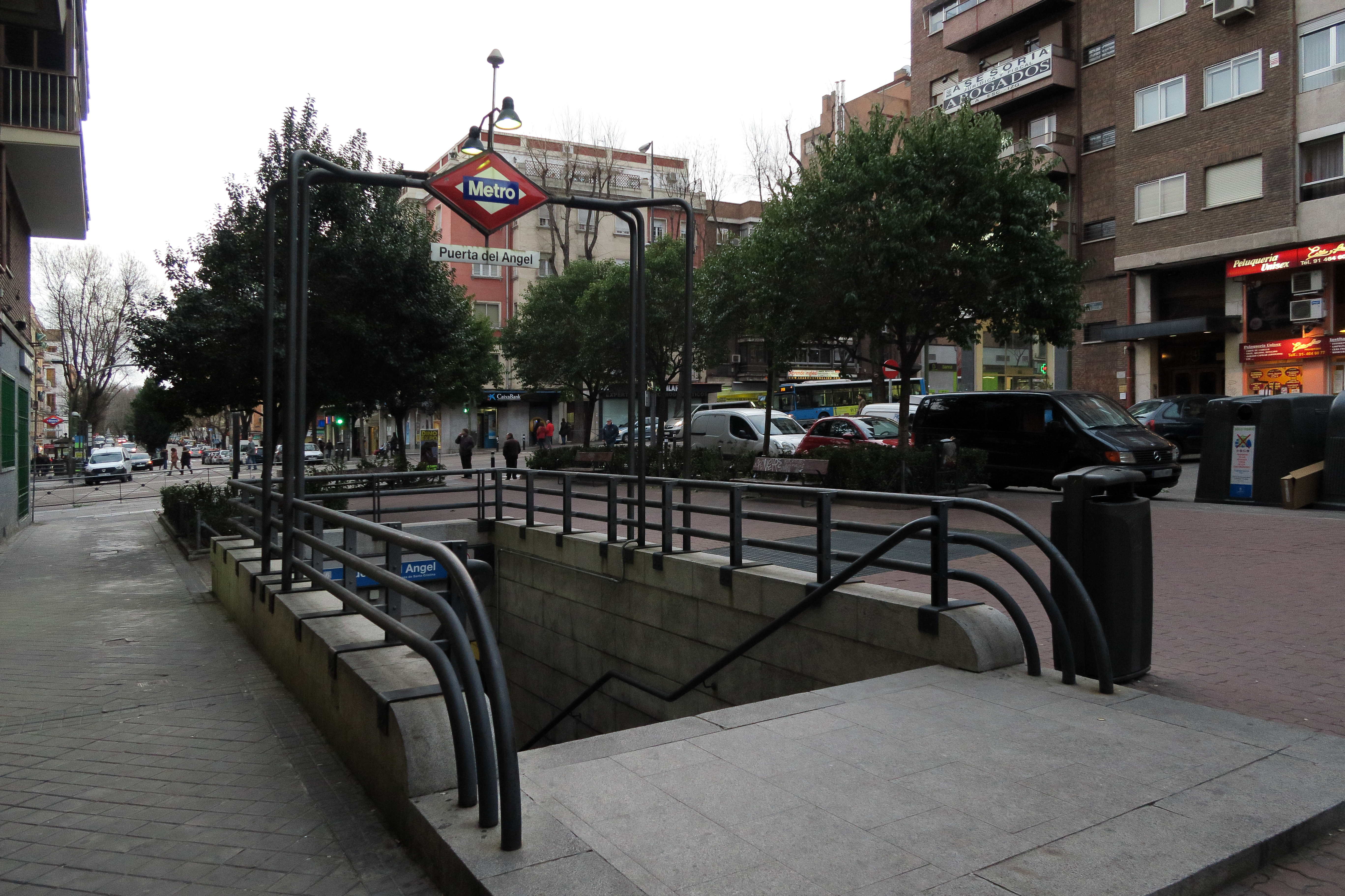 Estación de Puerta del Angel